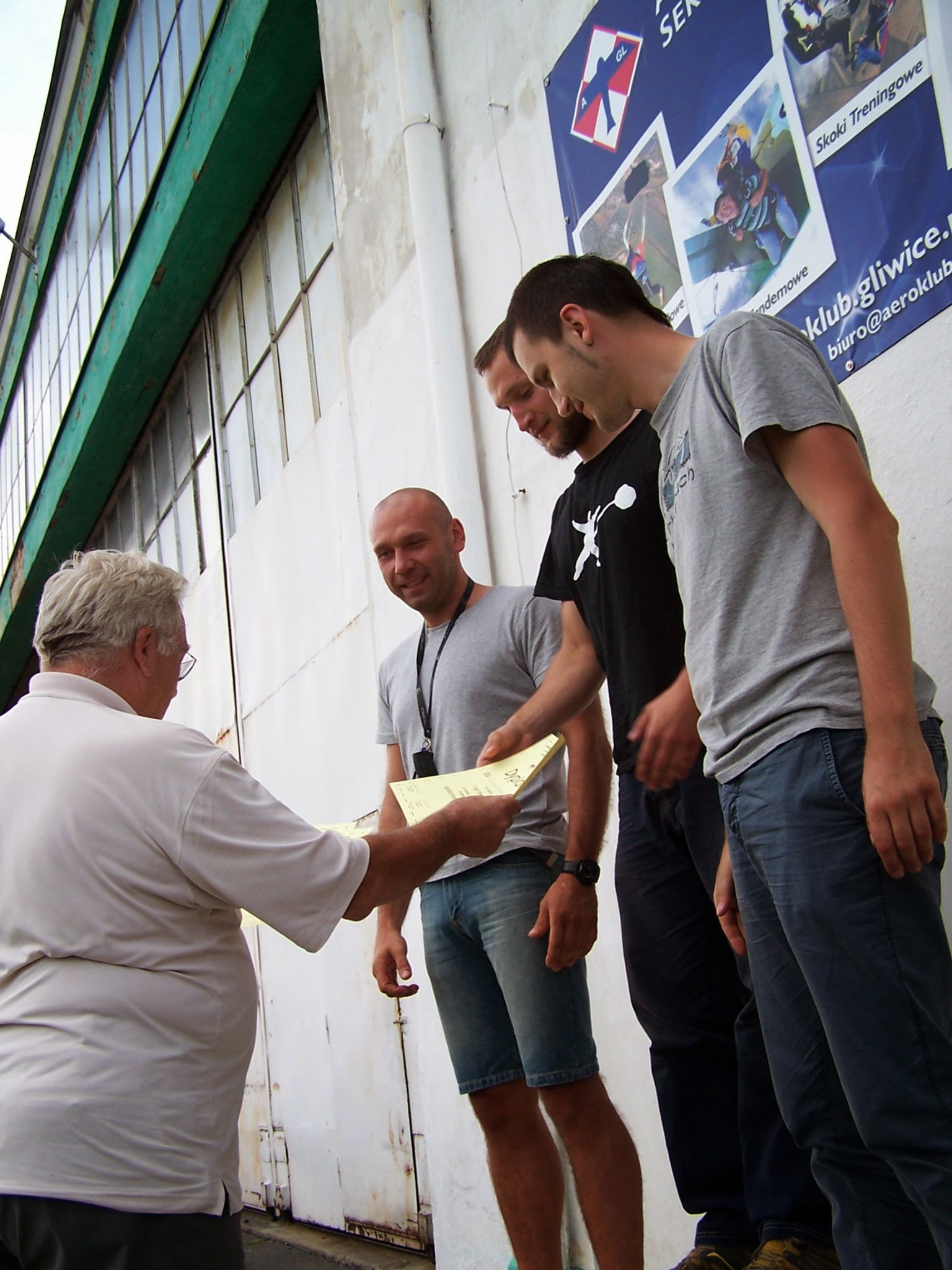 Spadochronowe Mistrzostwa Śląska 2013. Zwycięzcy w klasyfikacji indywidualnej (celność lądowania - spadochrony szkolne): I miejsce - Krzysztof Konopacki (23 m), II miejsce - Rafał Ratajczak (23 m), III miejsce - Marcin Banaszak (29 m) — Sekcja Spadochronowa Aeroklubu Gliwickiego. Dyplomy wręcza Kazimierz Stępniewski — Prezes VII Oddziału Katowice Związku Polskich Spadochroniarzy